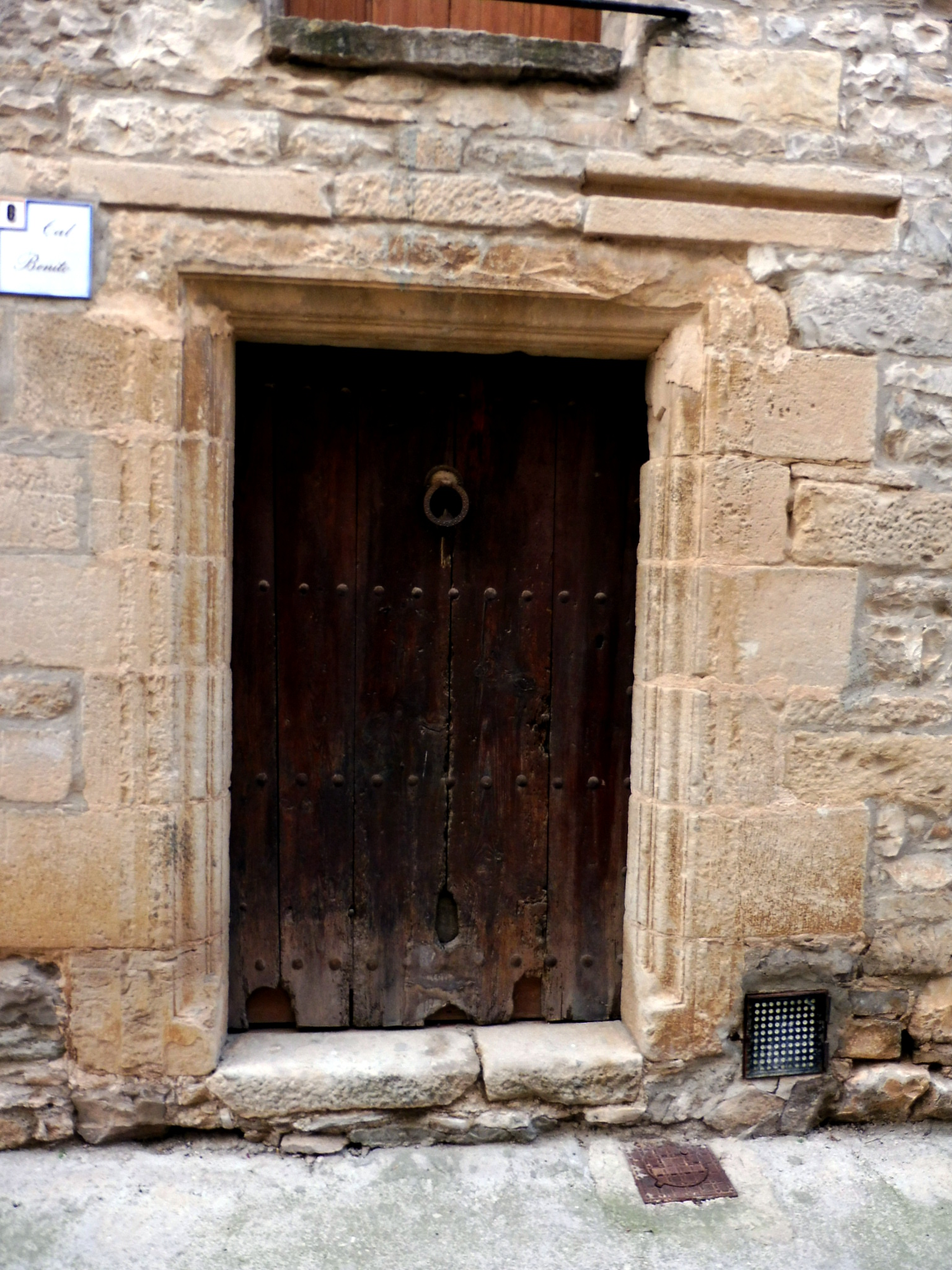 Cal Benito (Montoliu de Segarra): portada